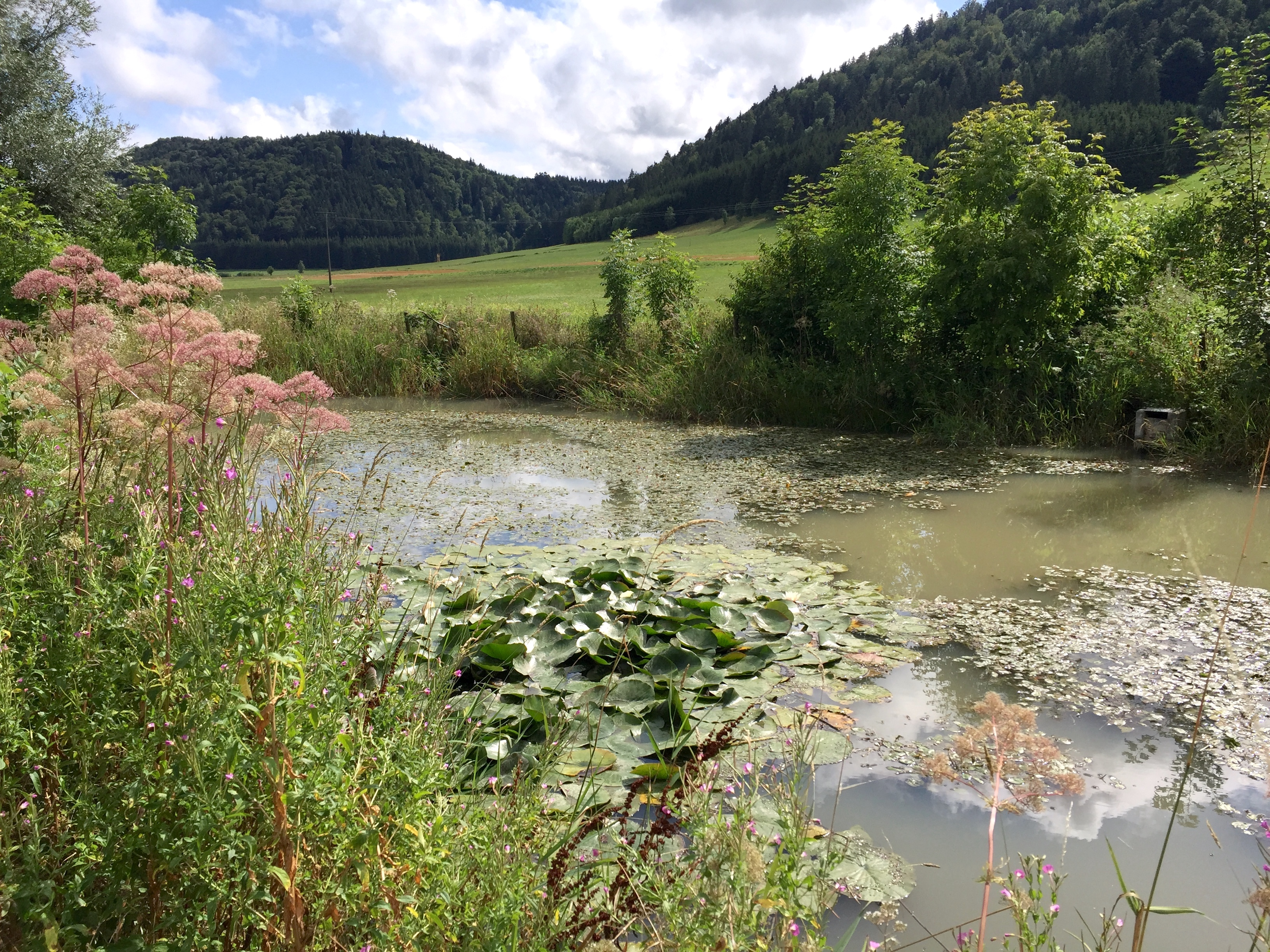 Retentionsfilterbecken Katzensteige bei Tieringen (Meßstetten)